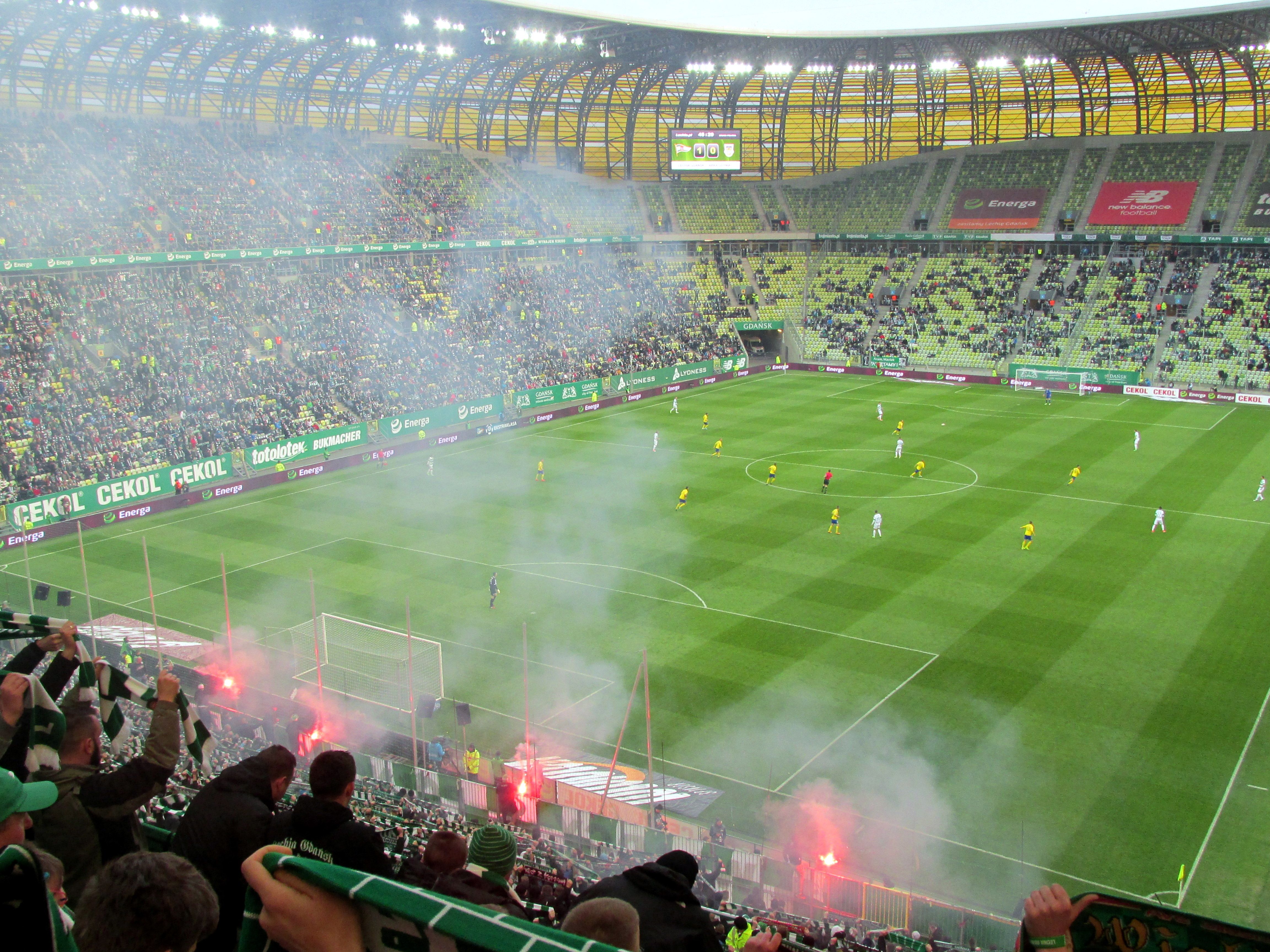 37. Derby Trójmiasta w piłce nożnej. Lecha Gdańsk - Arka Gdynia (2:1), 17 kwietnia 2017, Stadion Energa Gdańsk